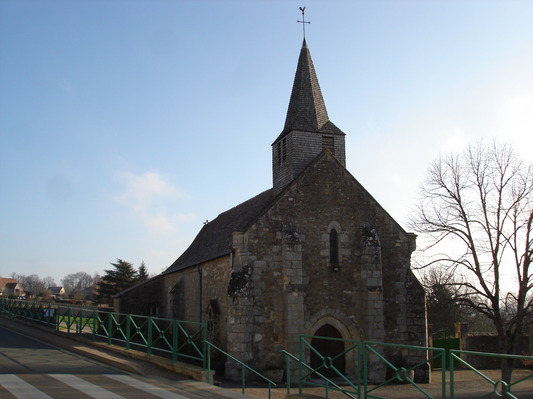 Verneuil-sur-Igneraie (36) : L'église.